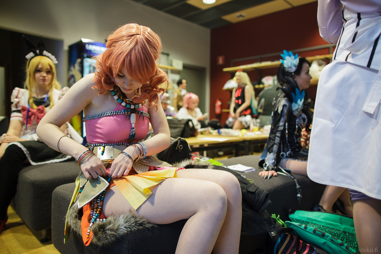 Desucon Frostbite 2014. Sibeliustalo, Lahti